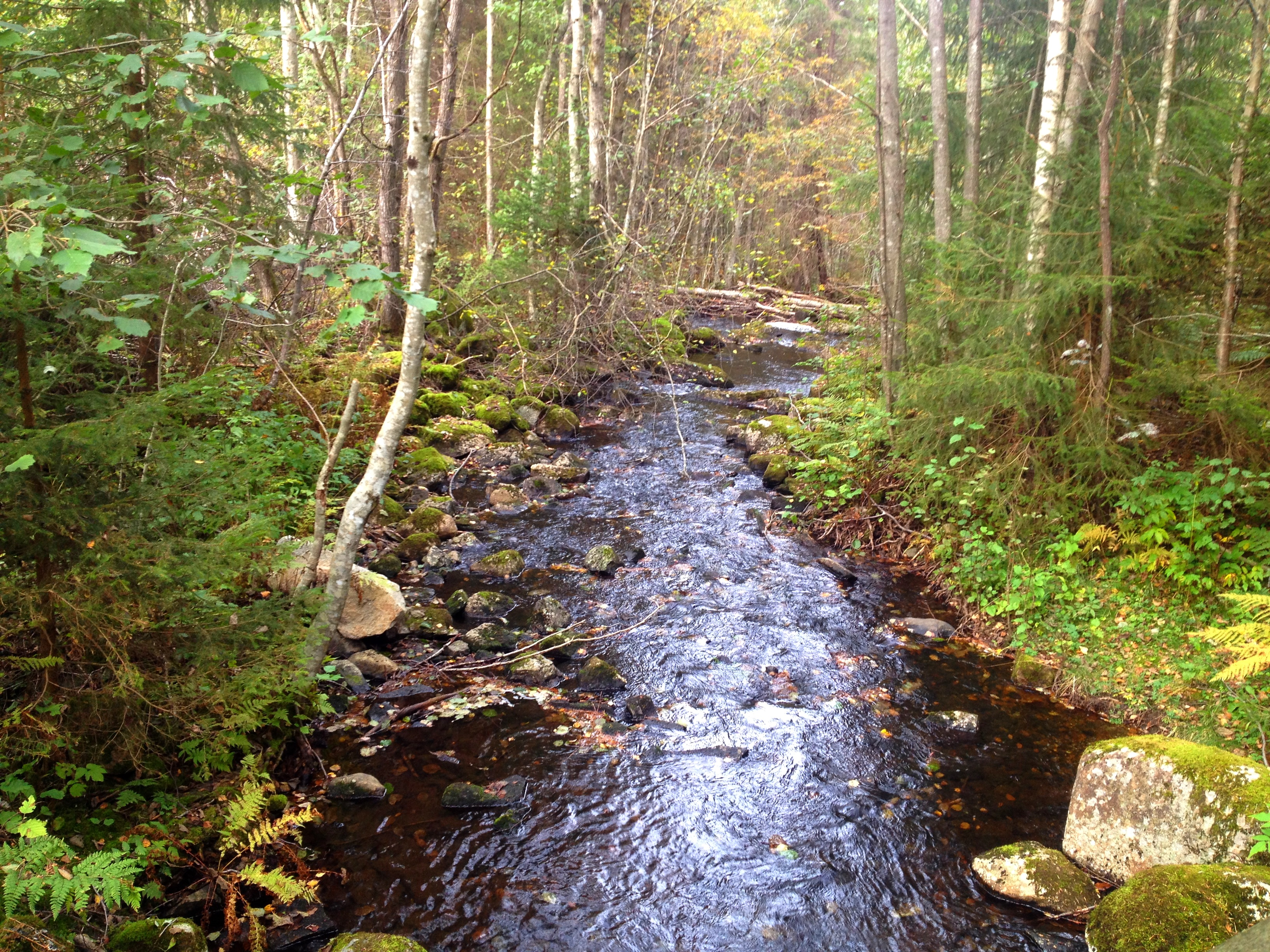 Ellingsrudelva